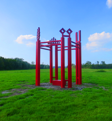 sculptuur Keukenhof